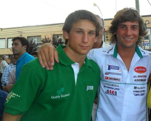 Franco De Benedictis, Piloto argentino de TC Pista Mouras